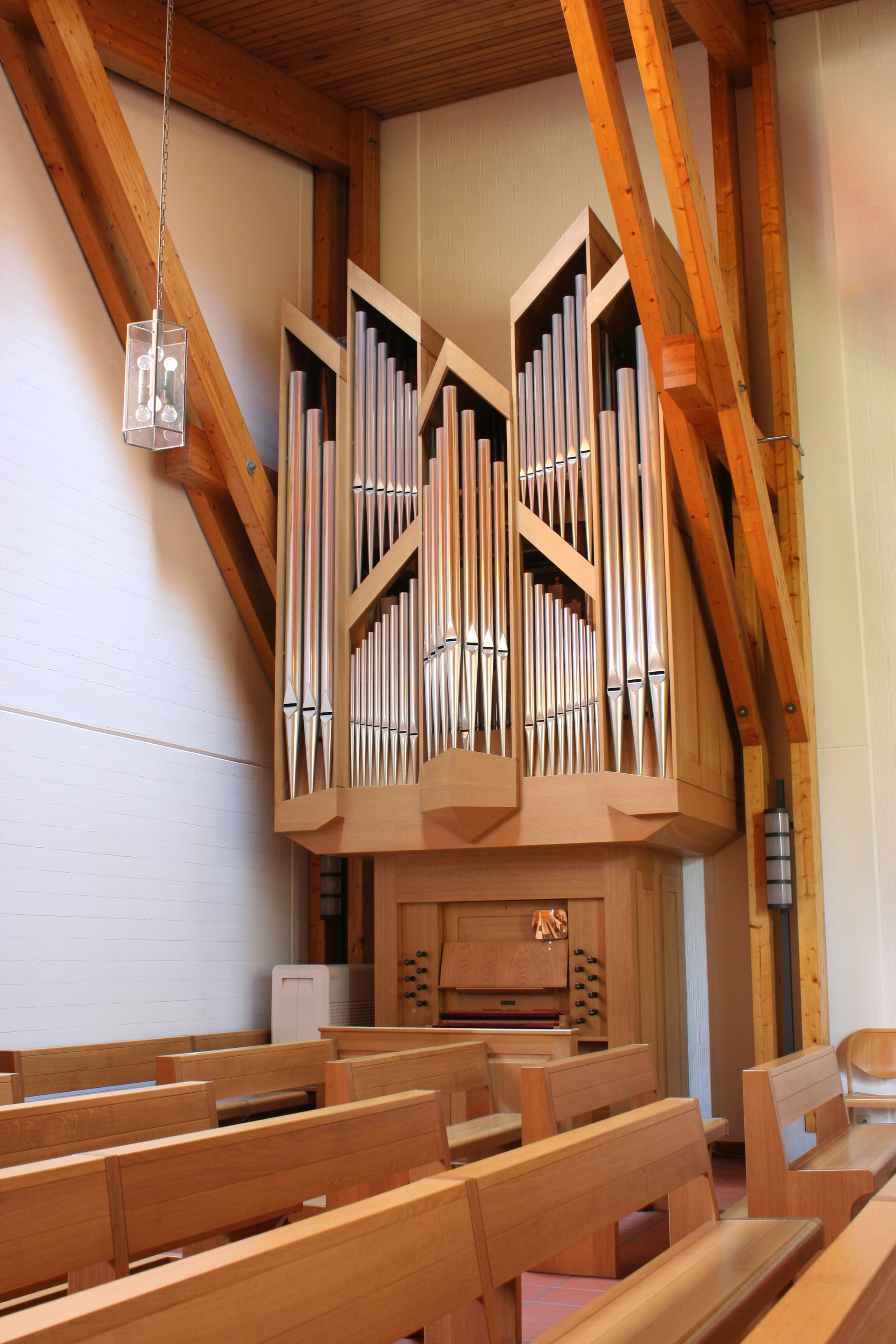 Römisch-katholische Kirche Bruder Klaus Bäretswil